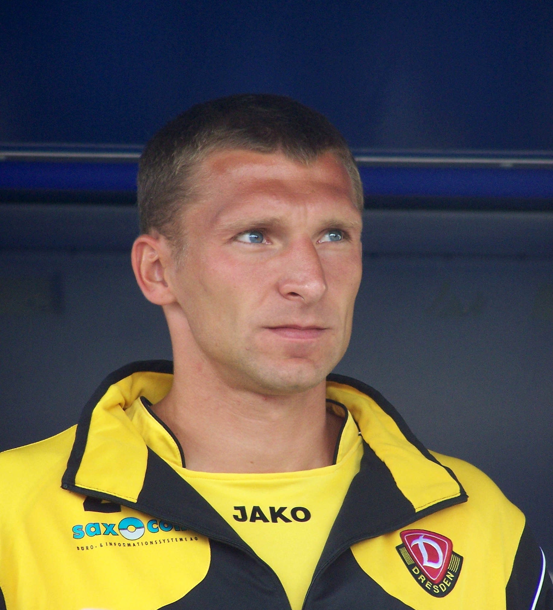 Maik Wagefeld bei der Teampräsentation von Dynamo Dresden zum Start der Drittliga-Saison 2008/09